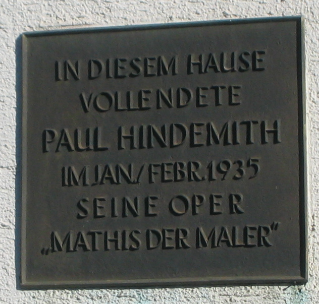 Tafel an dem Haus in Lenzrkich, in dem Paul Hindemith 1935 Mathis der Maler vollendete.